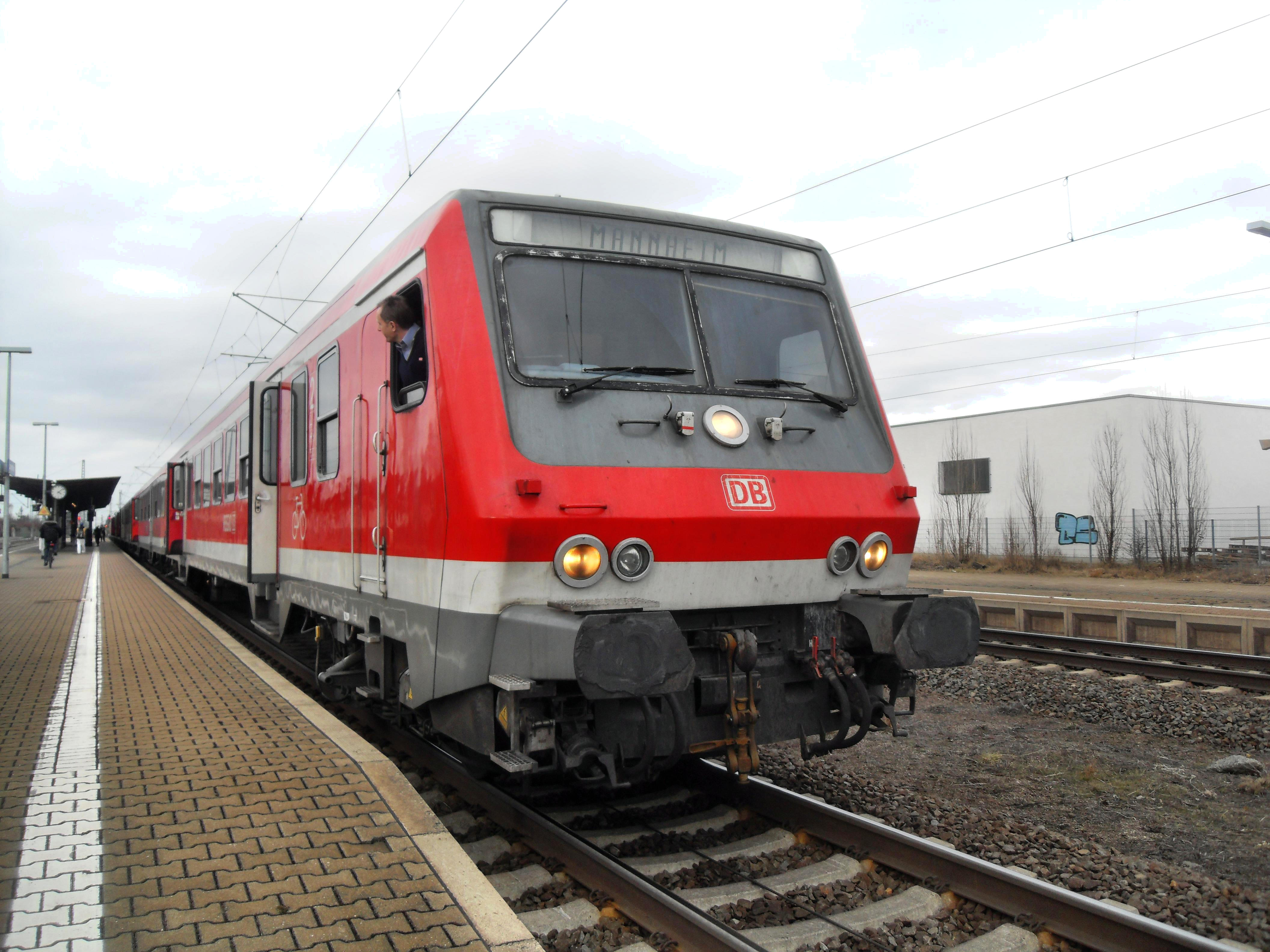 RE auf der Riedbahn im Lampertheimer Bahnhof auf dem Weg nach Mannheim